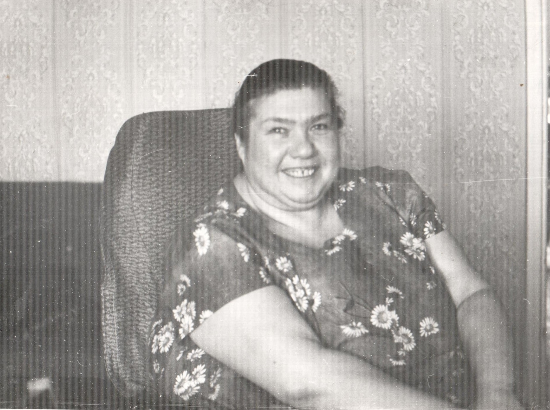 Артемьева Елена Юрьевна дома во время визита ее учеников